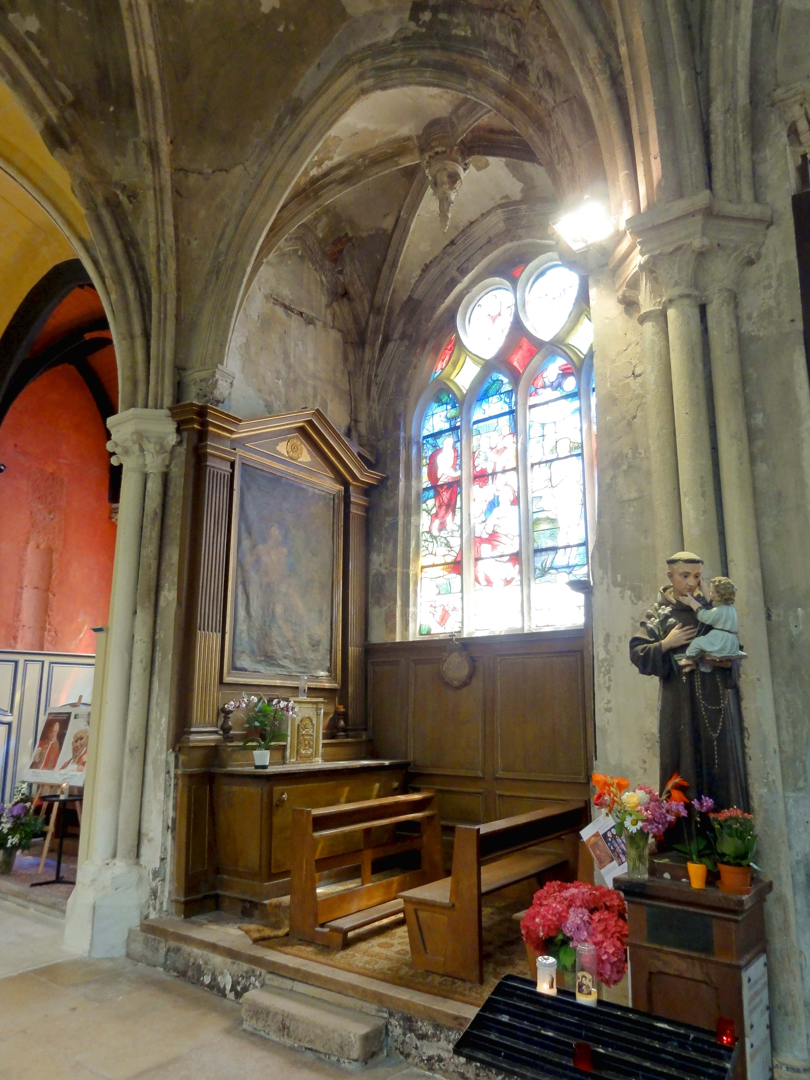 Voir titre.